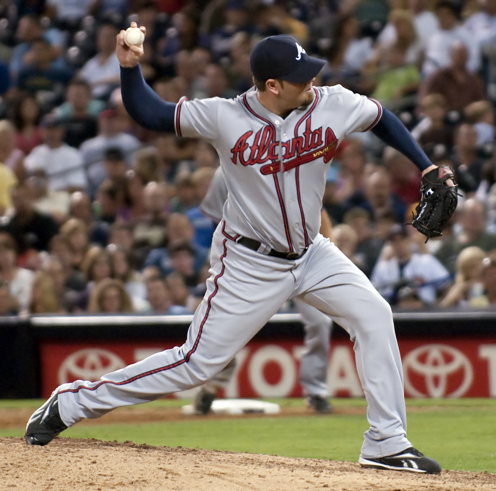 Peter Moylan